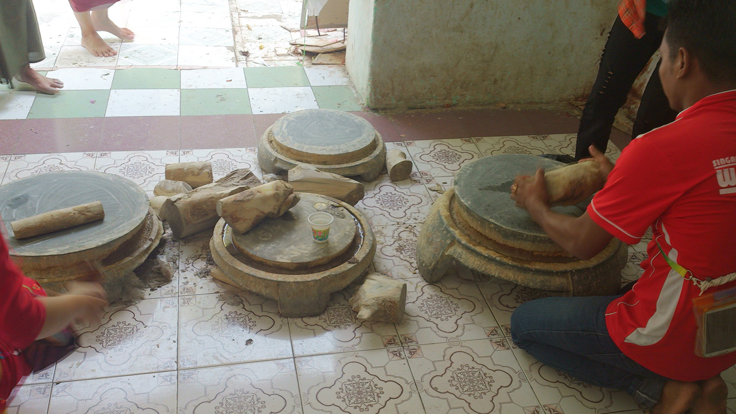 မြန်မာဘာသာ: ရွှေဂူကြီးဘုရားတွင် ကျောက်ပျဉ်ပေါ် သနပ်ခါးသွေးနေစဉ်